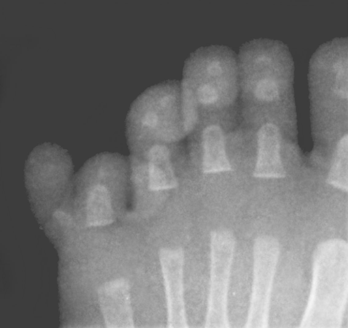 Hexadaktylie am linken Fuß beim Säugling